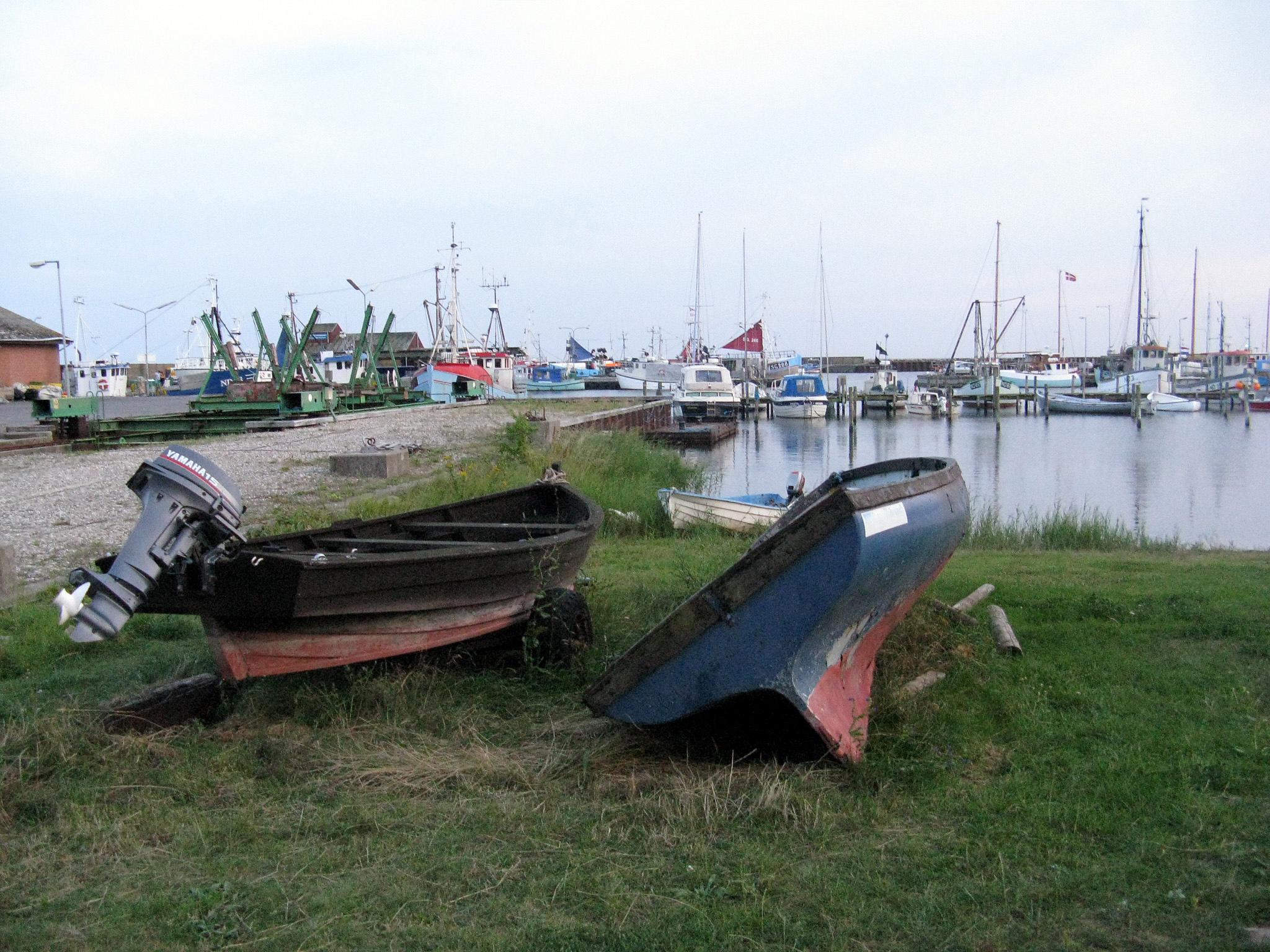 Klintholm Havn på Møn in Denmark